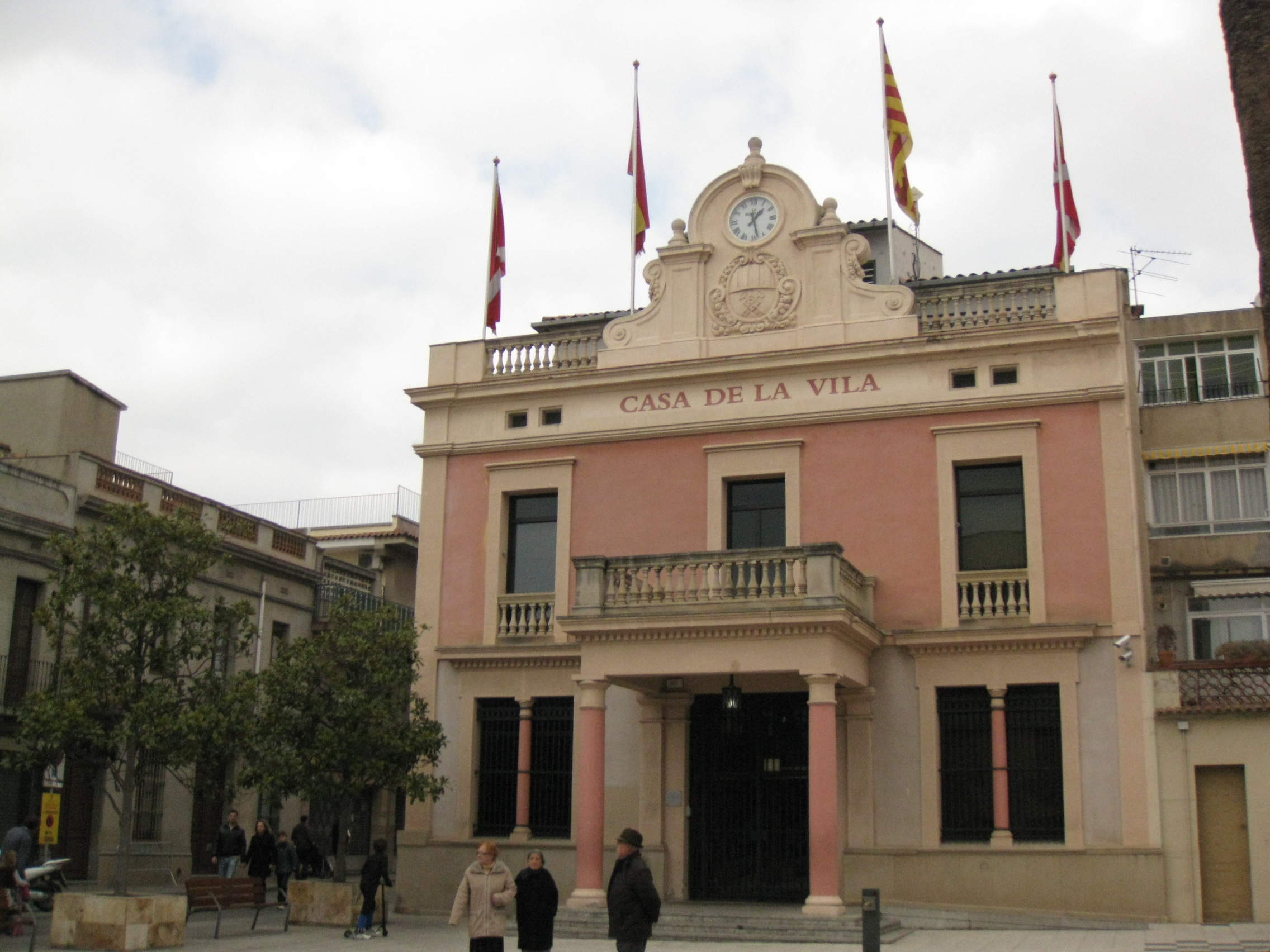 Ajuntament de Rubí